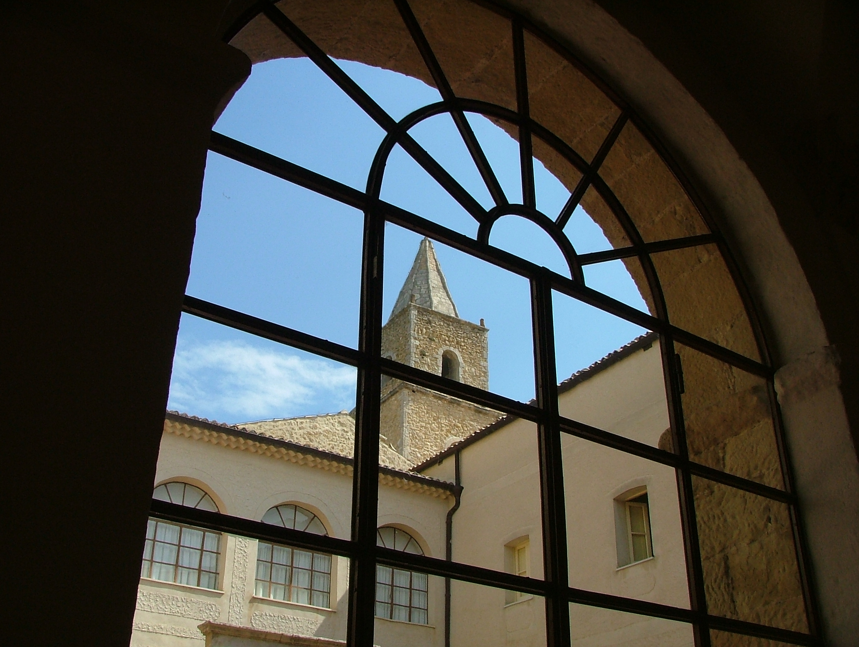 Autore Rocco STASI, fatta da me Tricarico - Campanile del convento di Sant'Antonio di Padova (sec. XV) attraverso un finstrone del quadriportico. GFDL